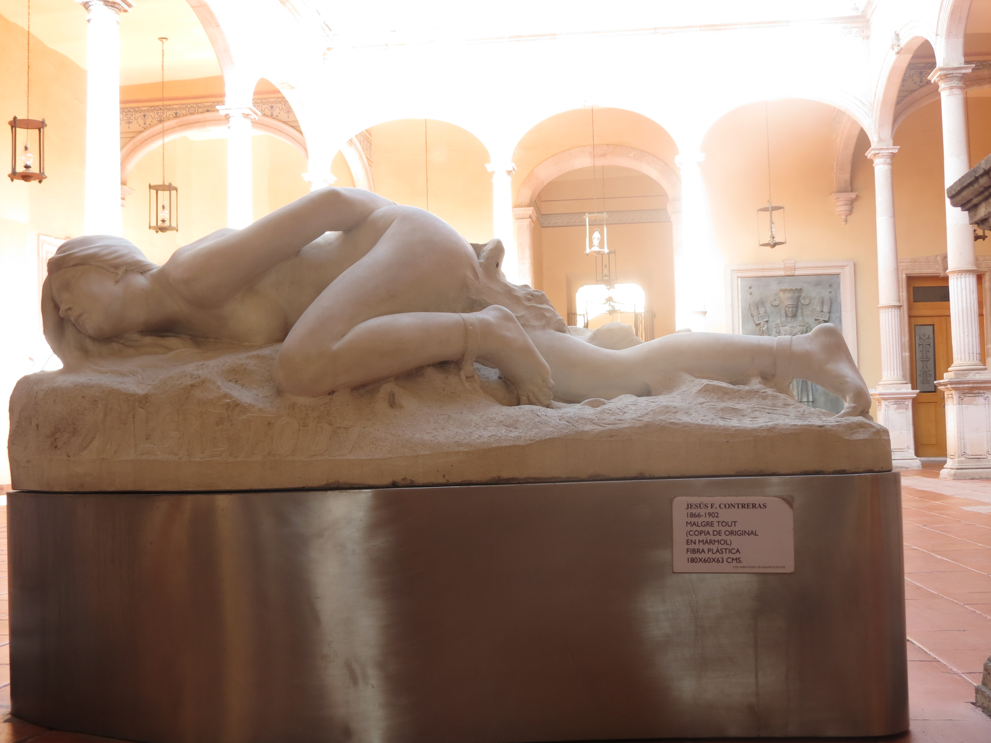 Réplicas del 'Malgre Tout' de Contreras en el Museo Aguascalientes